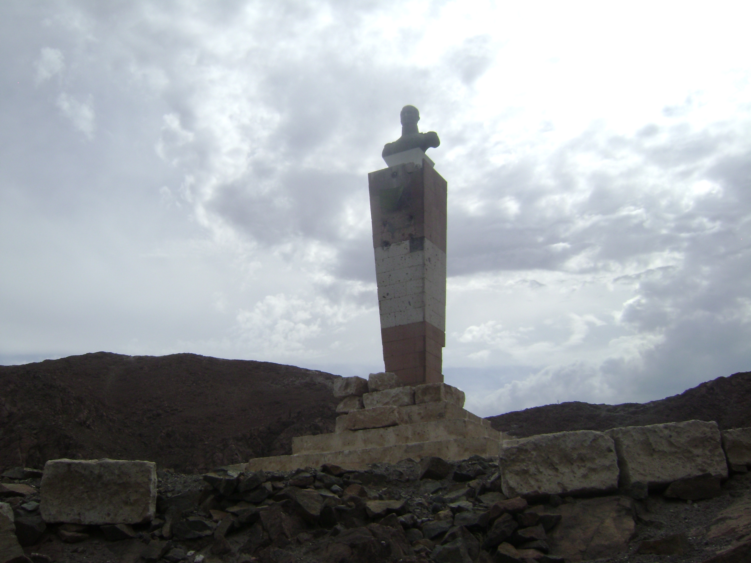 Busto del General Felipe Santiago Salaverry en el cerro que lleva su nombre.